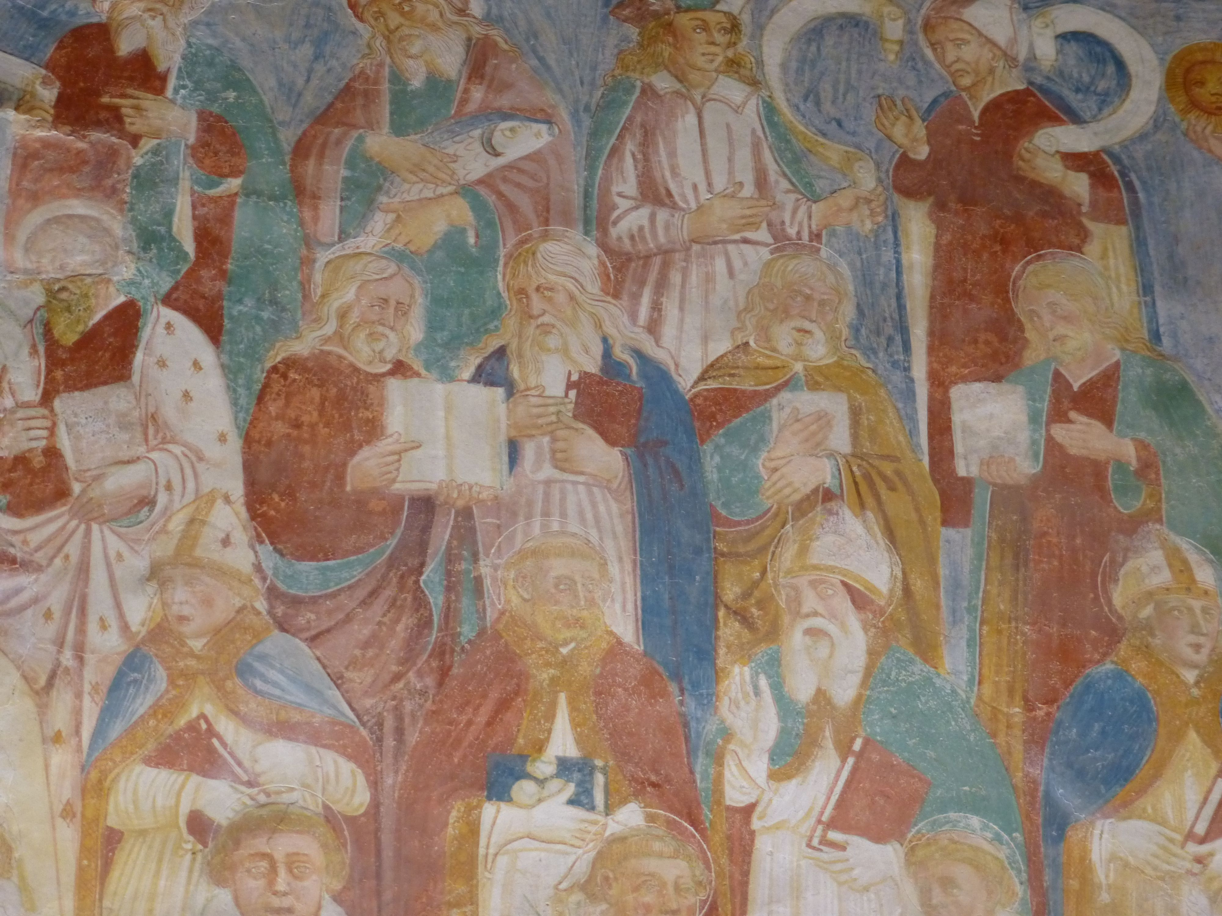 Fresko in der Vorhalle der Benediktinerabteil Santa Maria in Sylvis in Sesto al Reghena